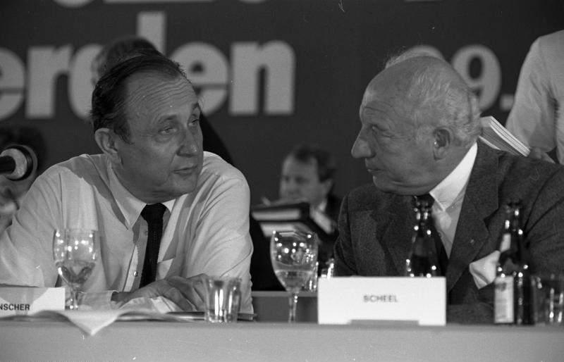 32. Ordentlicher Parteitag der FDP in der Halle 8 des Kölner Messegeländes.